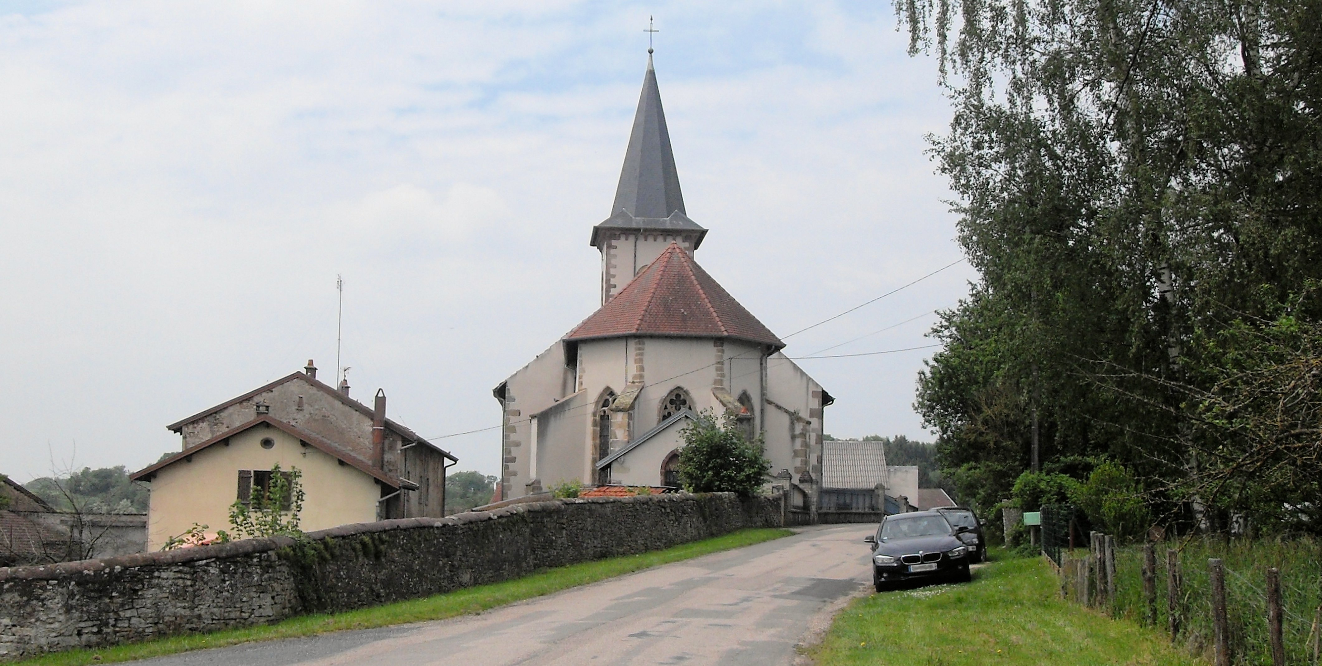 L'église Saint-Martin de Nossoncourt